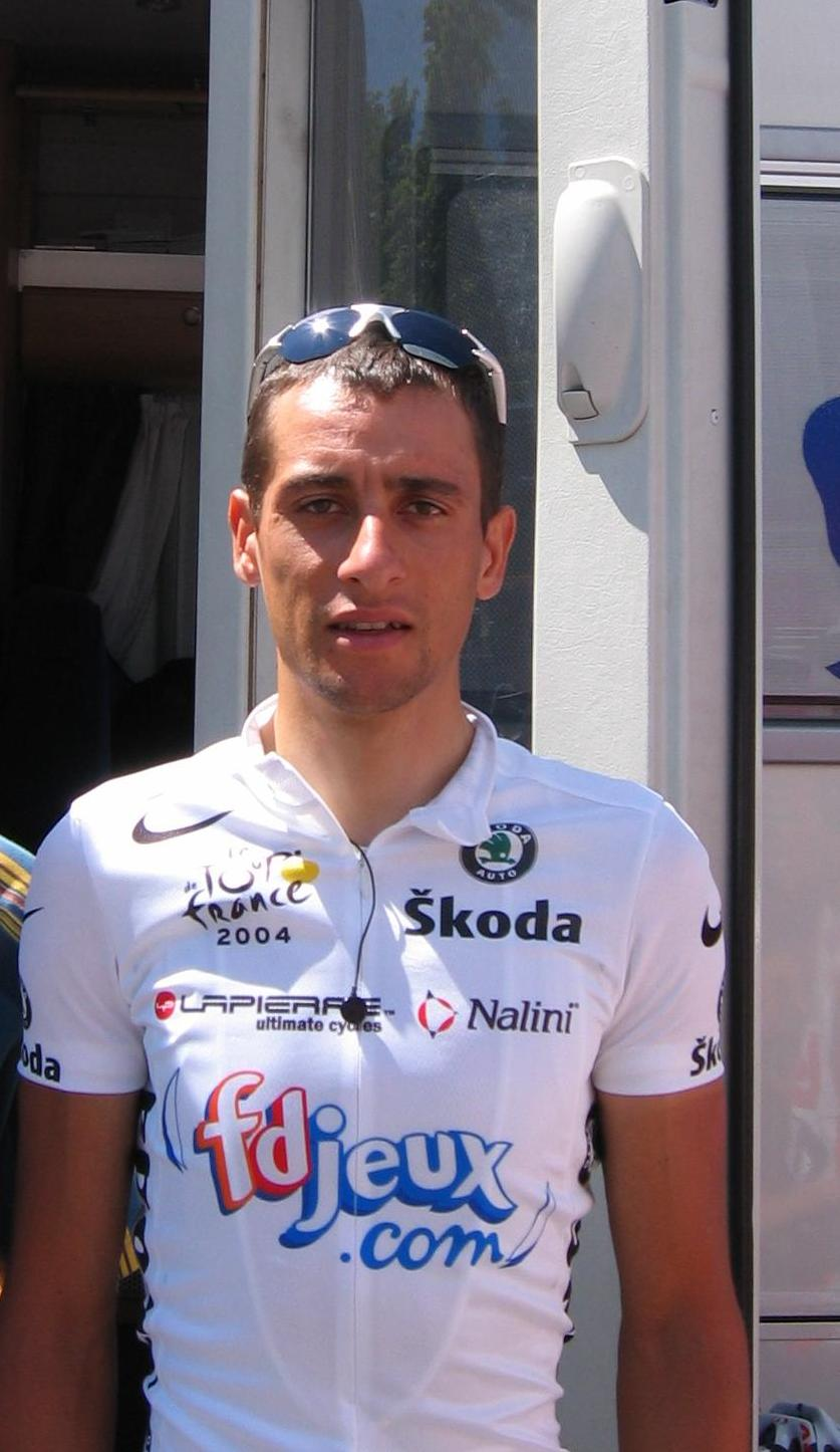 Le coureur cycliste français Sandy Casar lors du Tour de France 2004 (départ de Saint-Flour). French cyclist from , Sandy Casar during the 2004 Tour de France (Saint-Flour, Cantal)